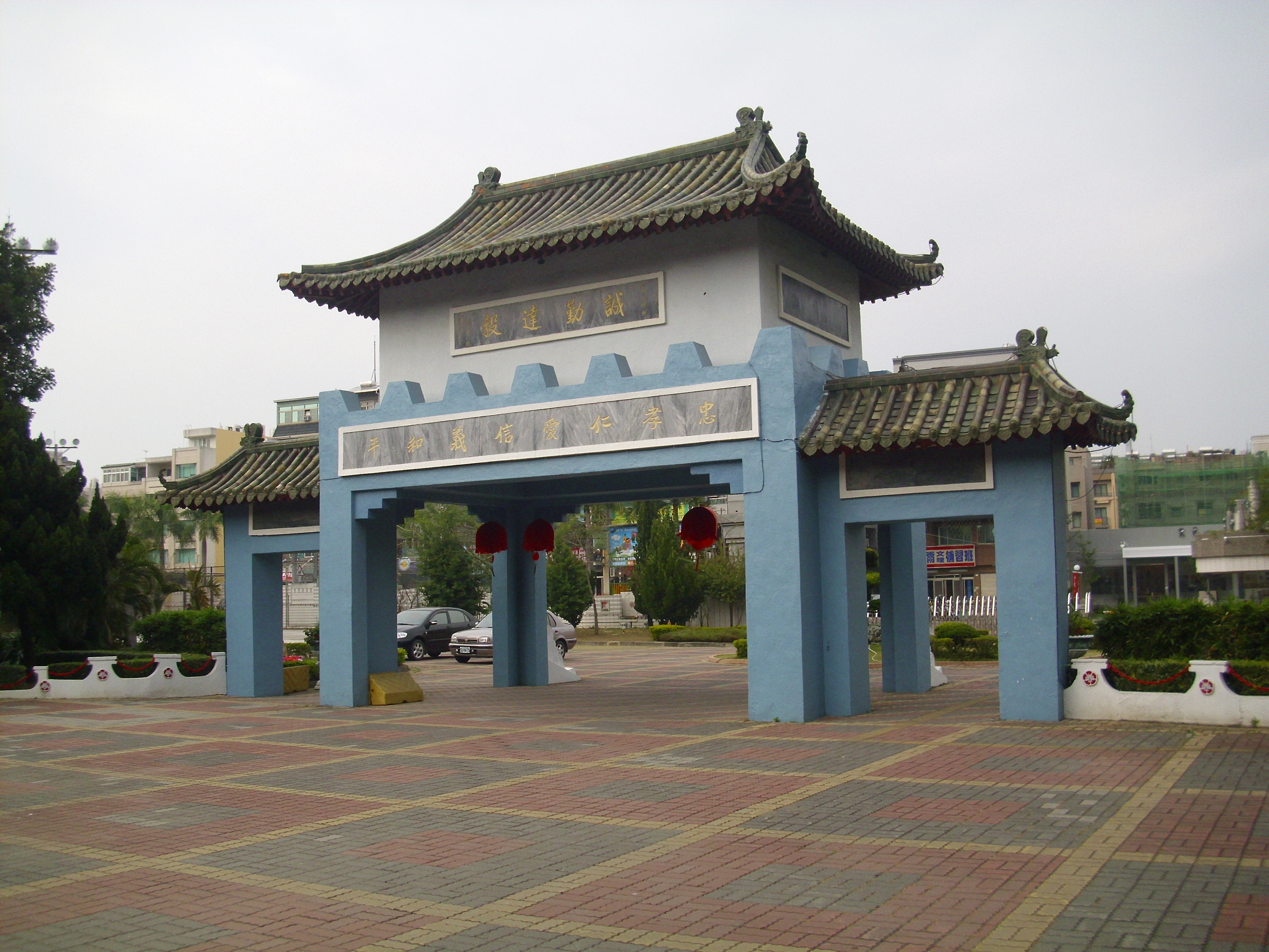 中文（台灣）: 臺南市立復興國民中學舊校門